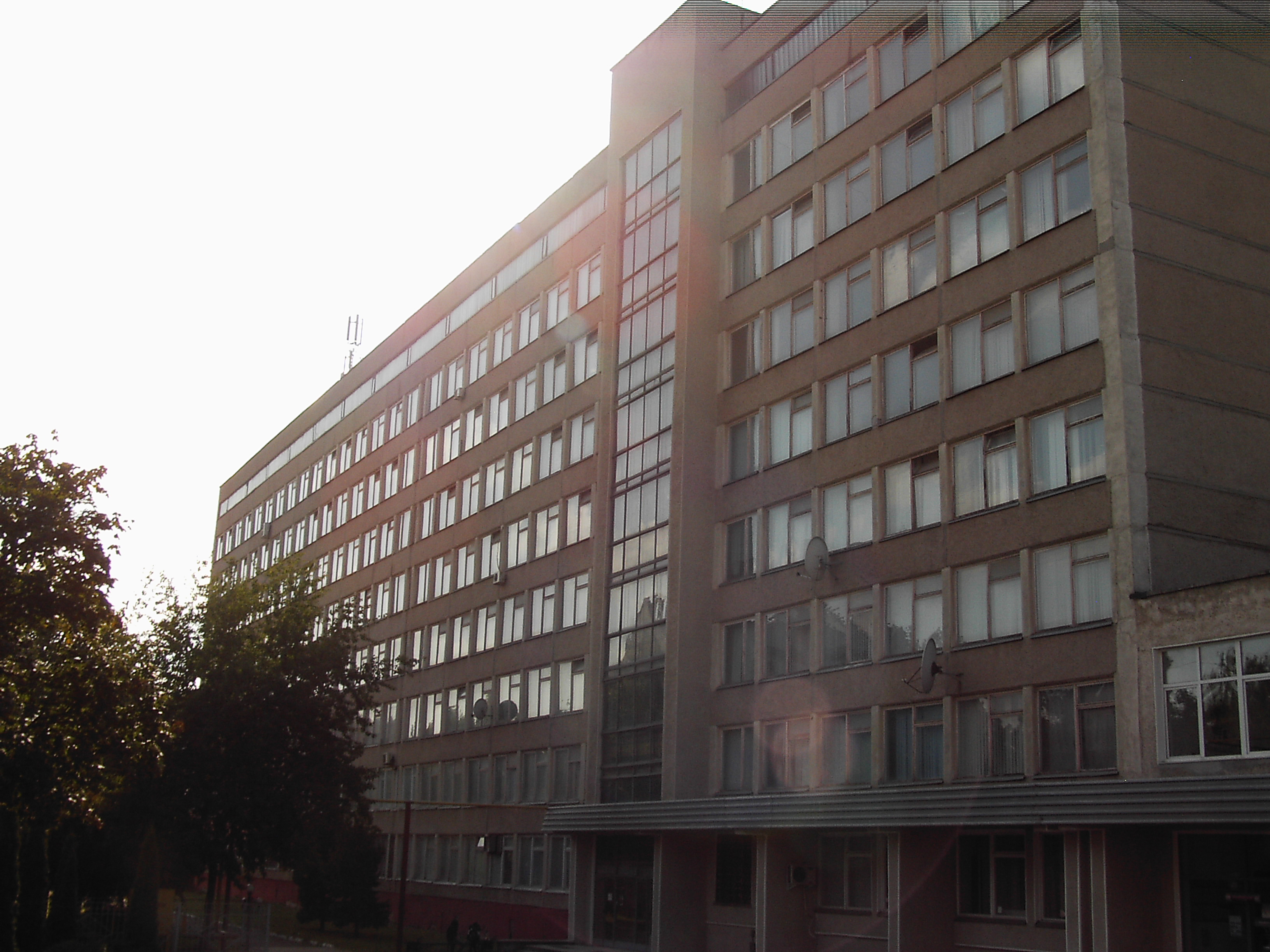 Прикарпатський Національний Університет імені Василя Стефаника. Гуманітарний Корпус. м. Івано-Франківськ-2